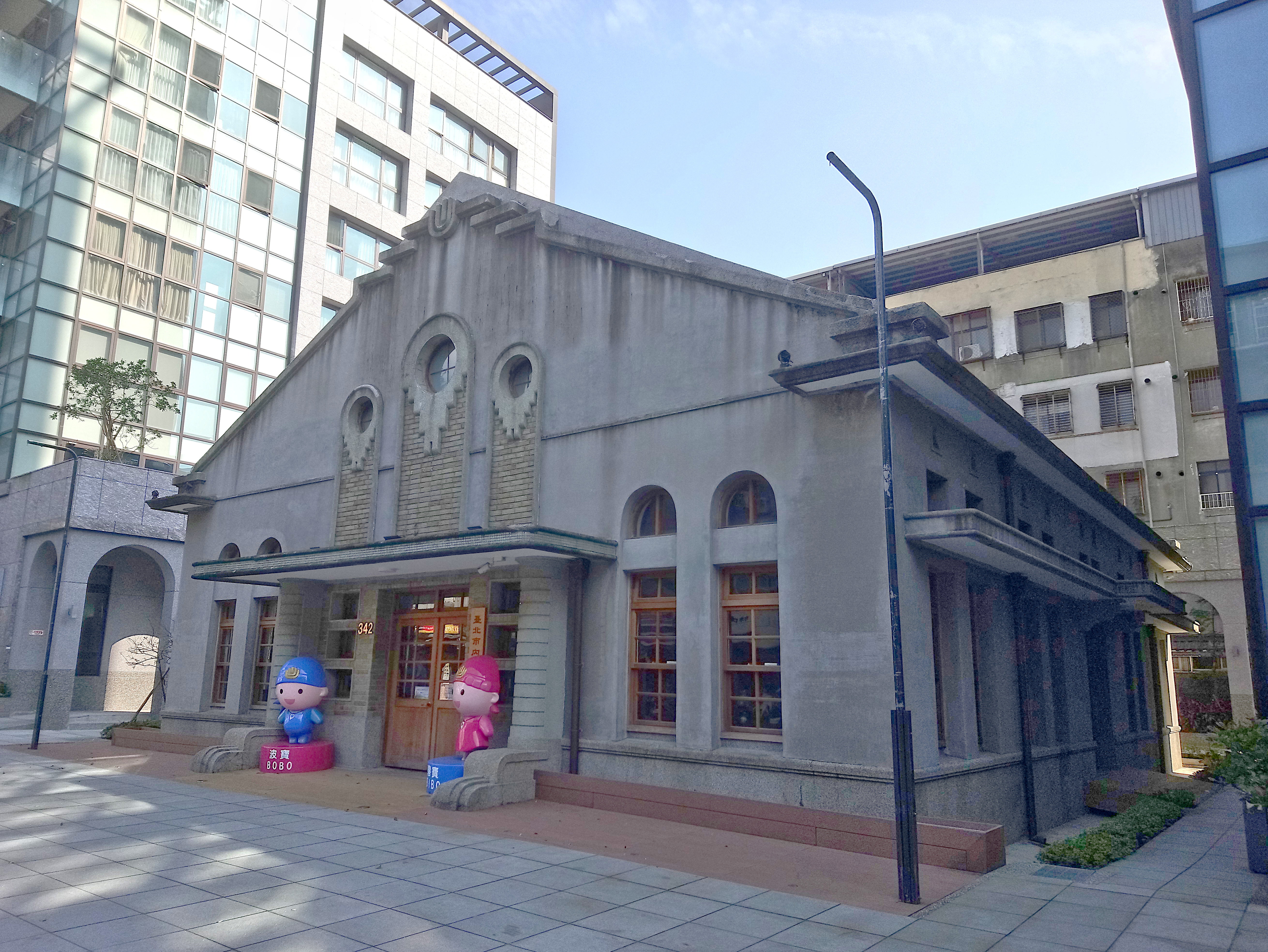 內湖庄役場會議室,台北市內湖區金龍次分區湖濱里